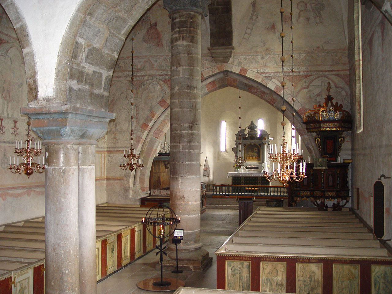 Gothems kyrka (Gotland) aus dem 13.Jh. Malereien (um 1300), wahrscheinlich von deutschem oder französischem Künstler